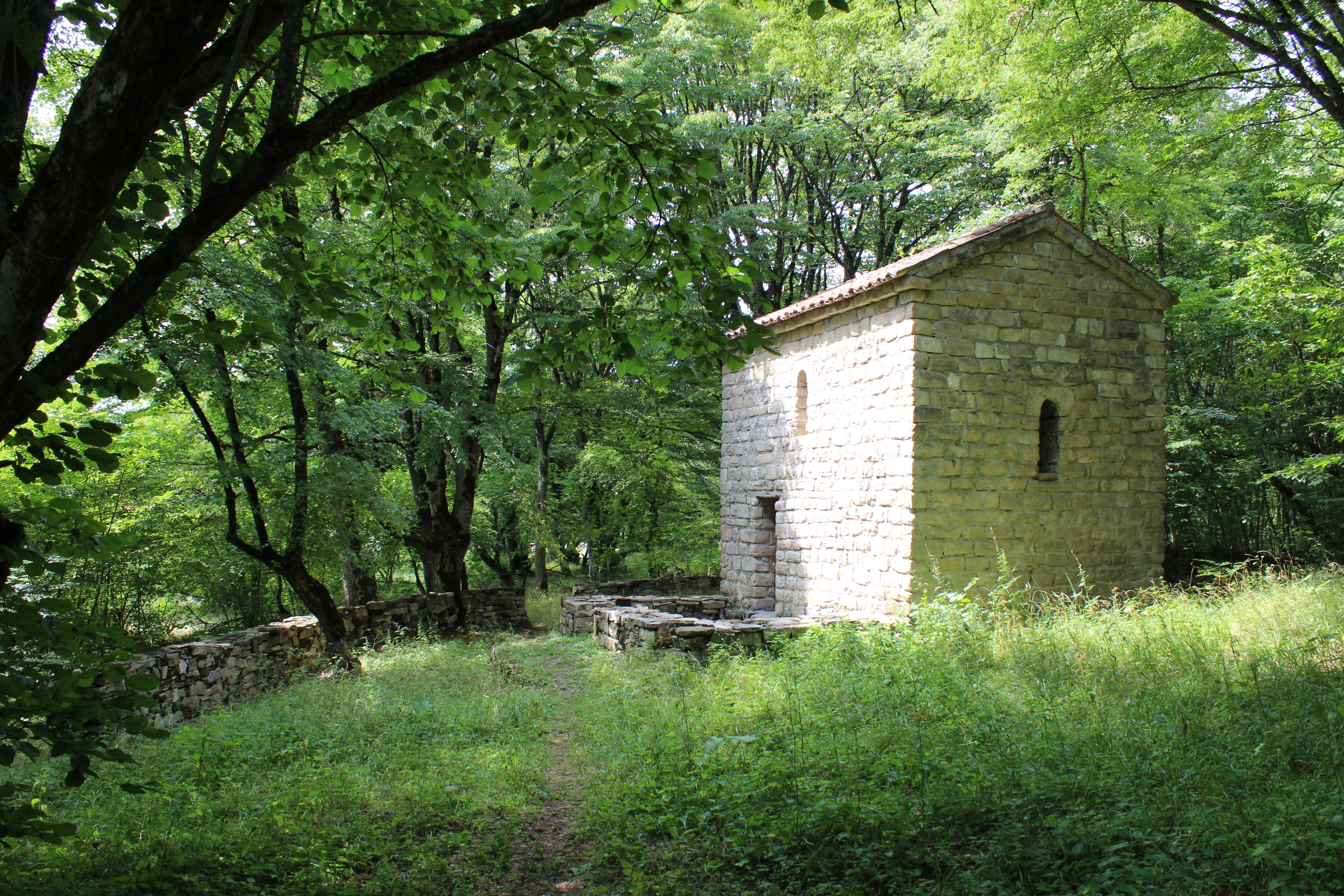 ჭერემის წმინდა ბარბარეს ეკელსია